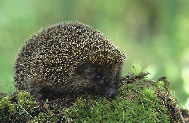 Erinaceus europaeus